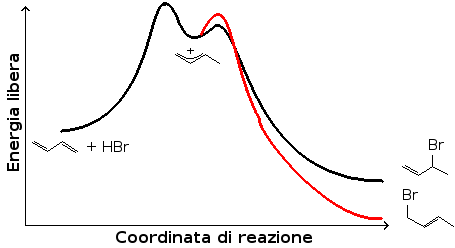 Addizione elettrofila di acido bromidrico all'1,3-butadiene: profilo energetico